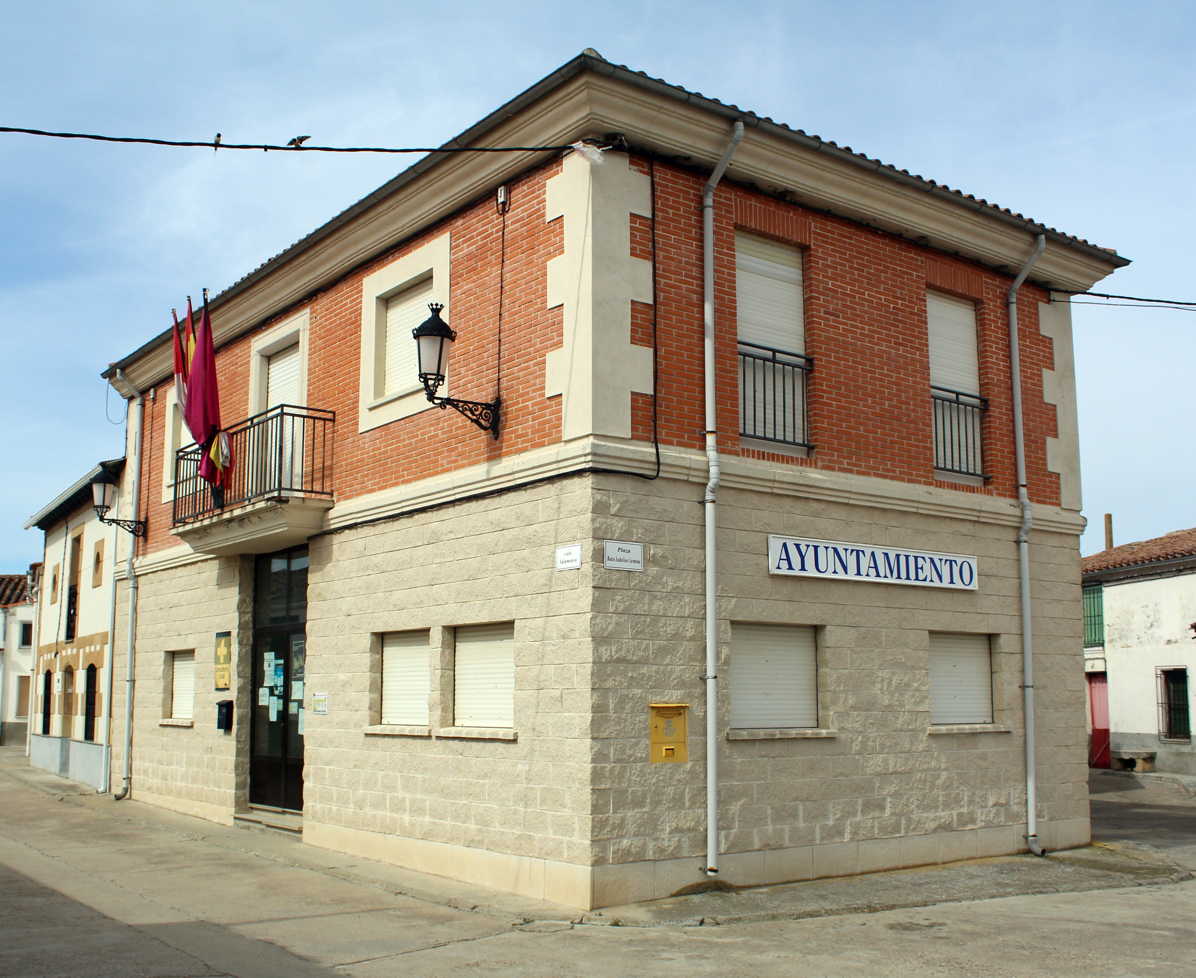 Ayuntamiento de Pajares de La Laguna, provincia de Salamanca